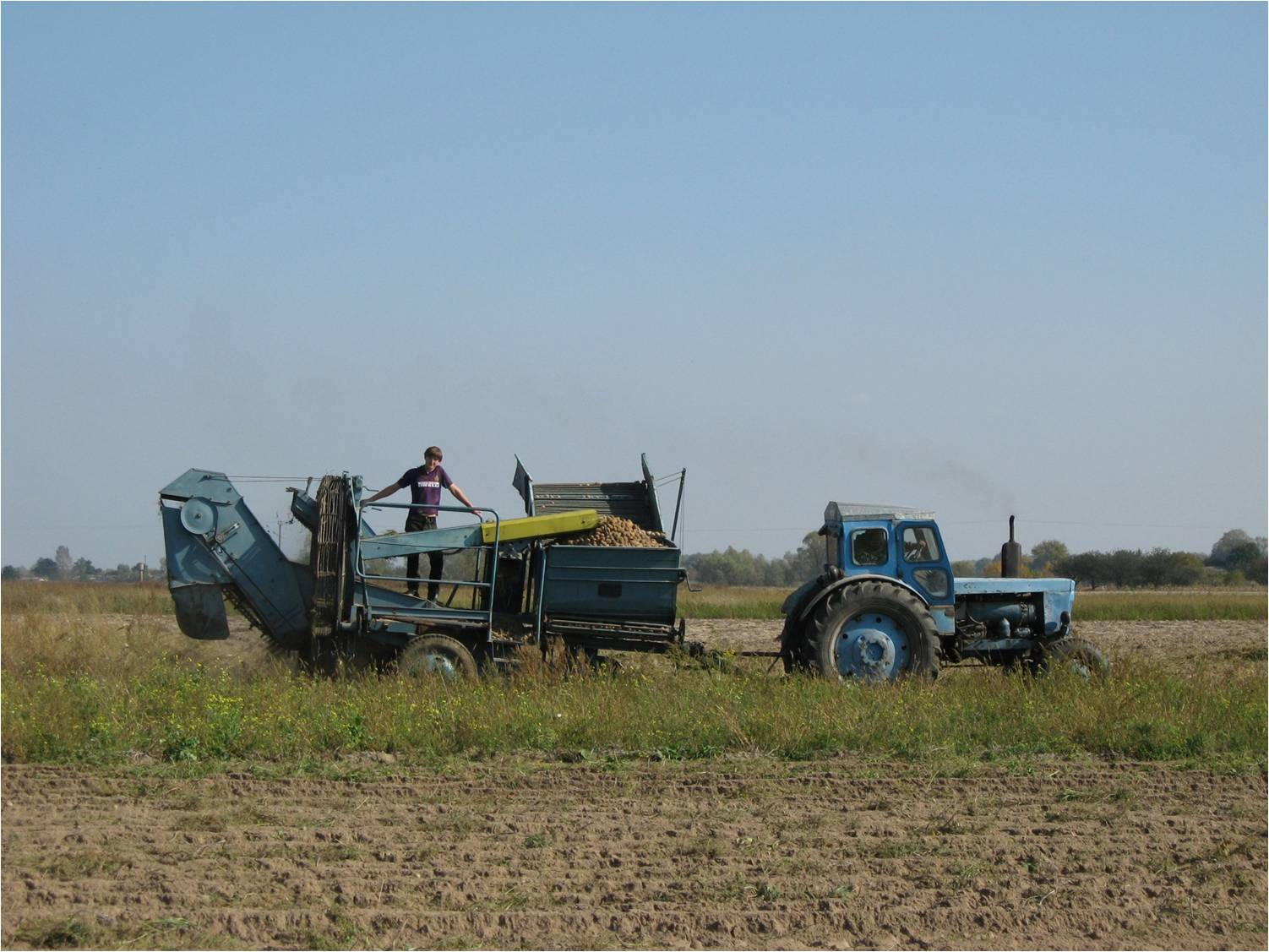 Картоплезбиральний комбайн "Анна" в агрегаті з трактором Т-40АМ Сосницький р-н Чернігівська обл.